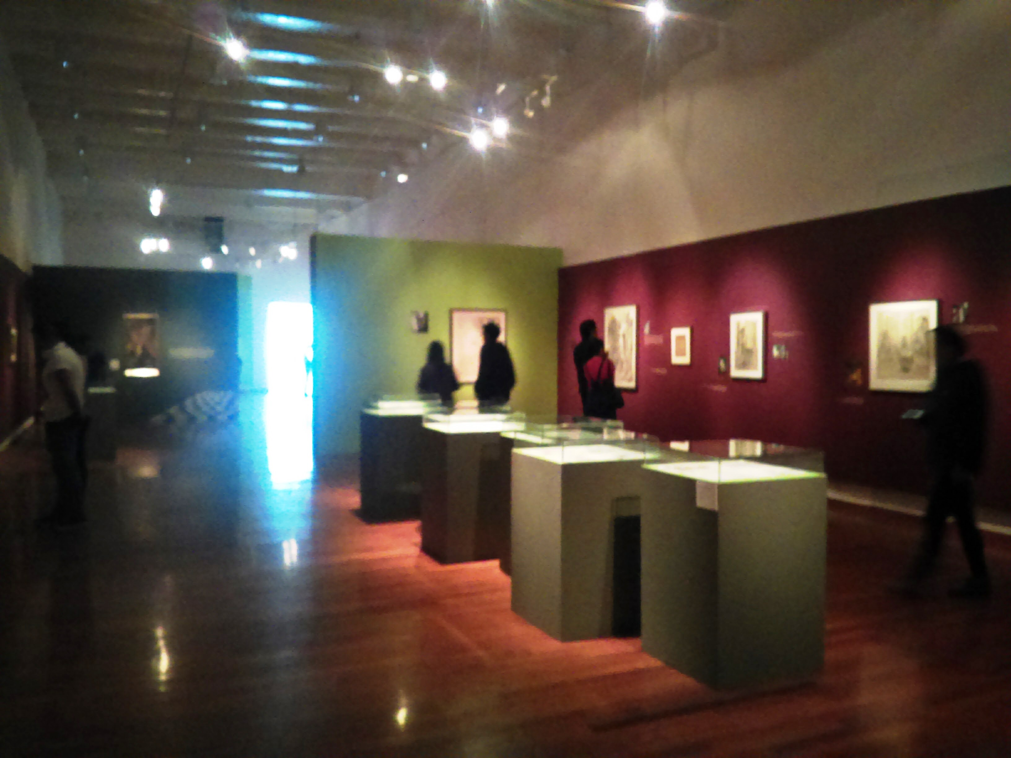 Exhibición temporal de Remedios Varo en el Cuartel del arte en Pachuca, México.